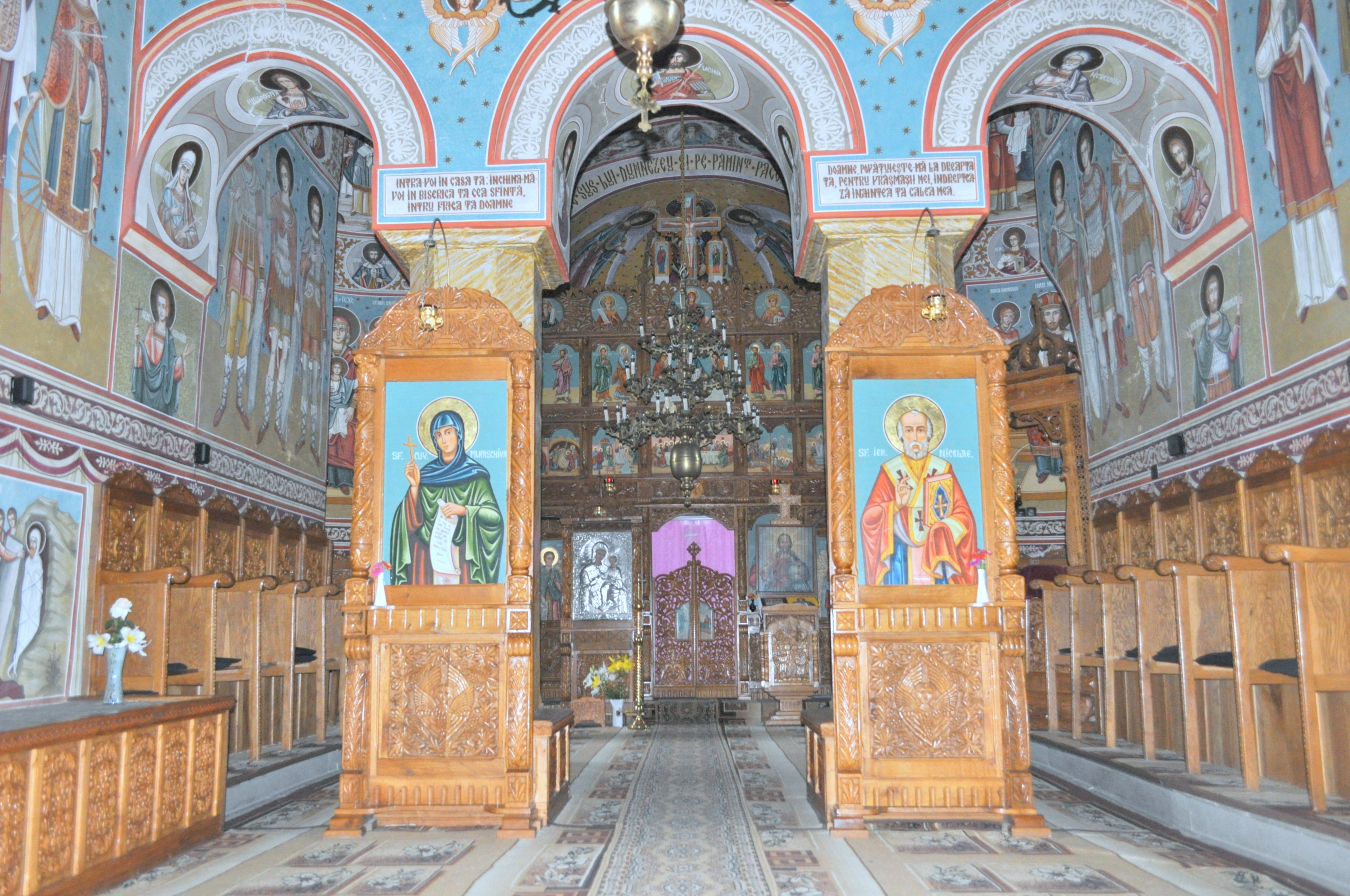 Mănăstirea Bogdana, Bacău